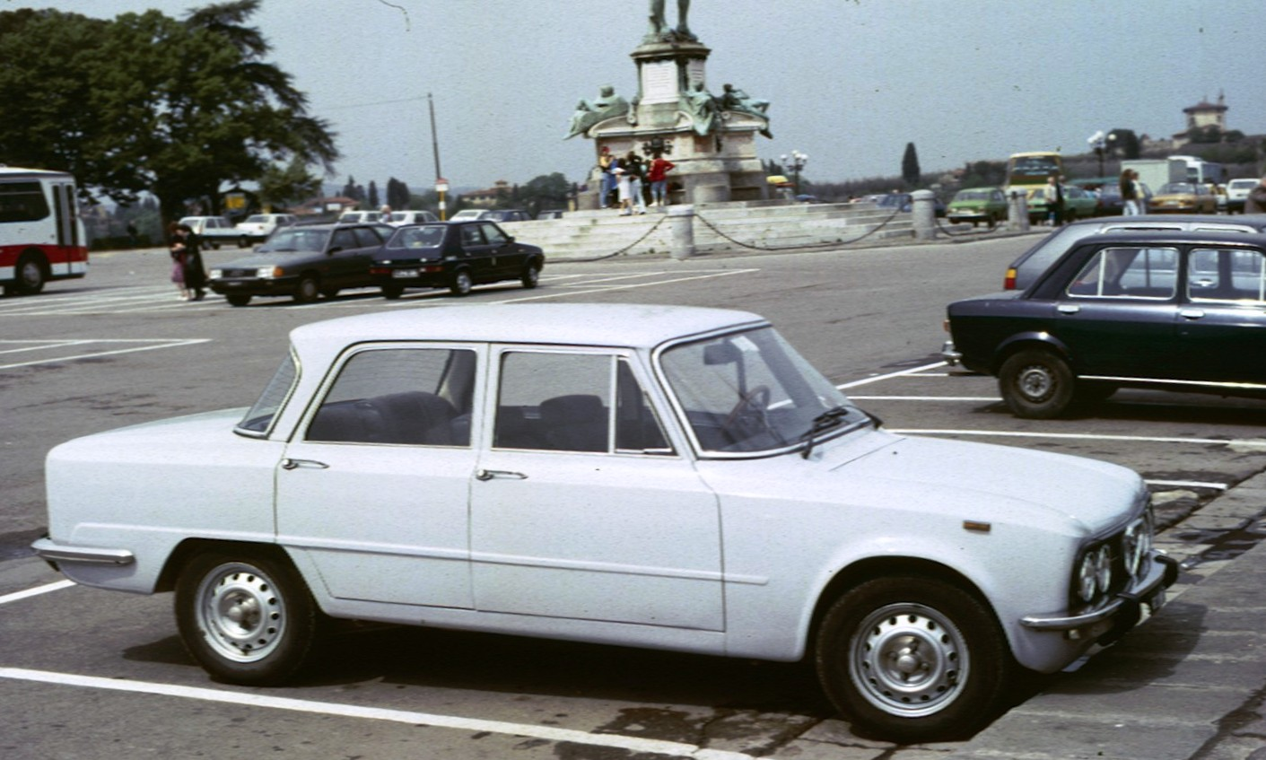 Alfa Romeo Giulia Nuova Super - 1978 in the Piazzale Michelangelo